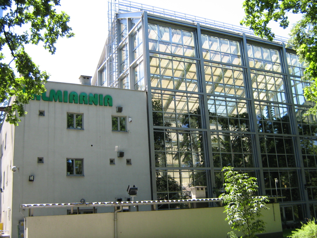 Budynek Palmiarnii w Łodzi